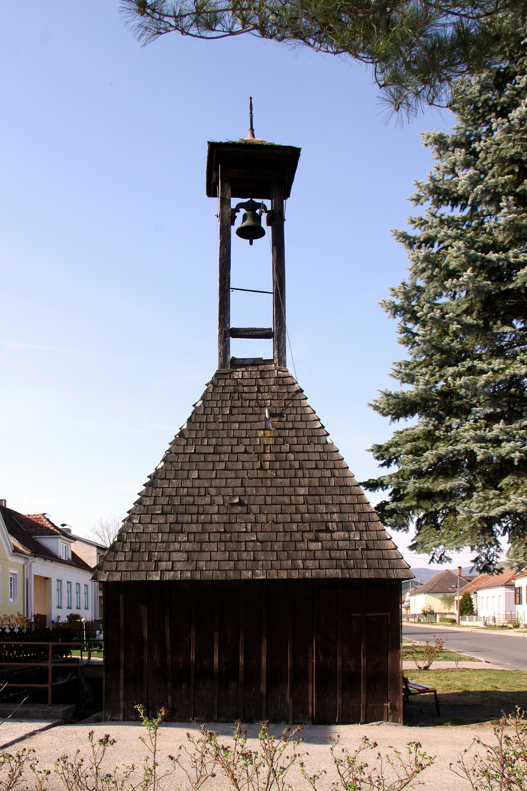 Schachendorf - Glockenstuhl-Wetterturm im Ortsteil Dürnbach. Object location47° 15′ 54.81″ N, 16° 23′ 25.59″ E